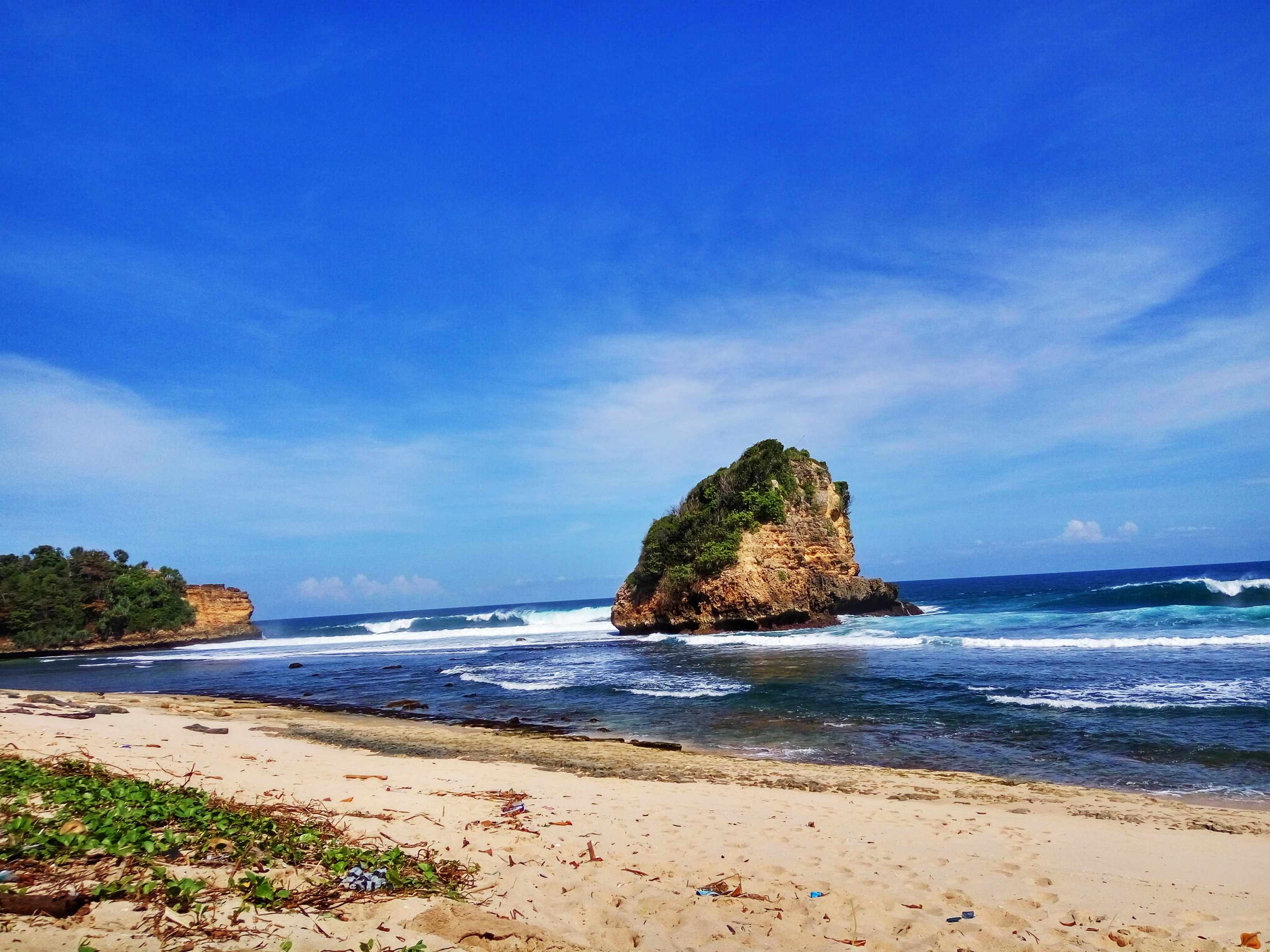 Pantai Ngudel termasuk pantai yang masih baru di Malang